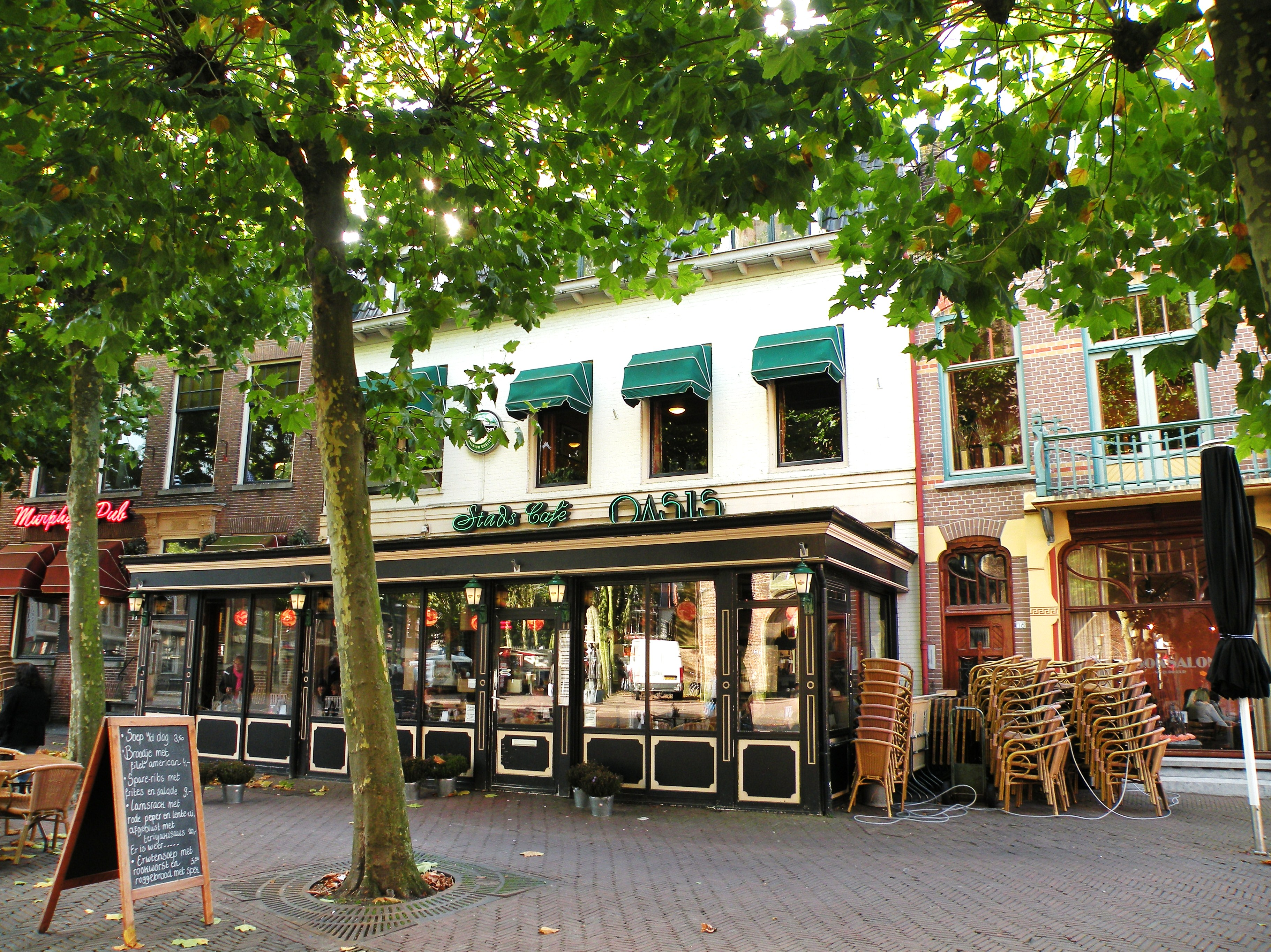 Kerkplein 15, Meppel-Stadscafe Oasis. Pand tussen 2 rijksmonumenten in.